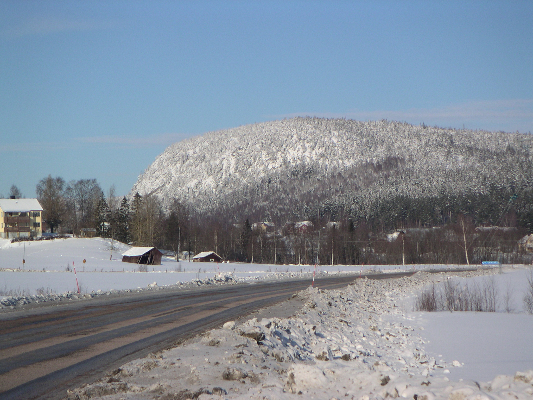 Billaberget